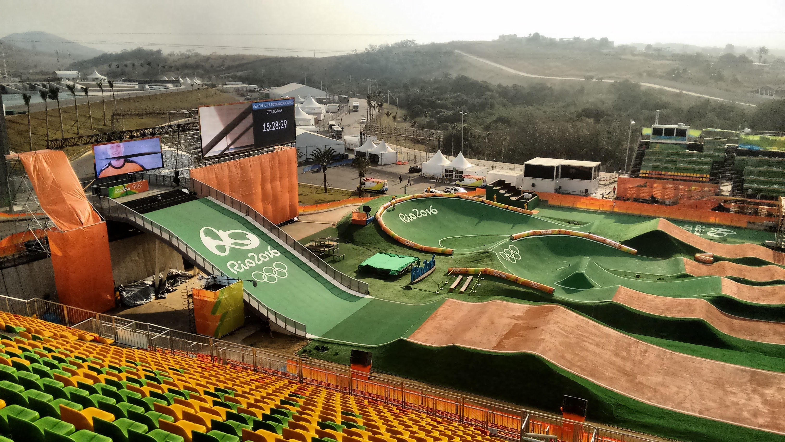 Visão do ultimo acento da arquibancada